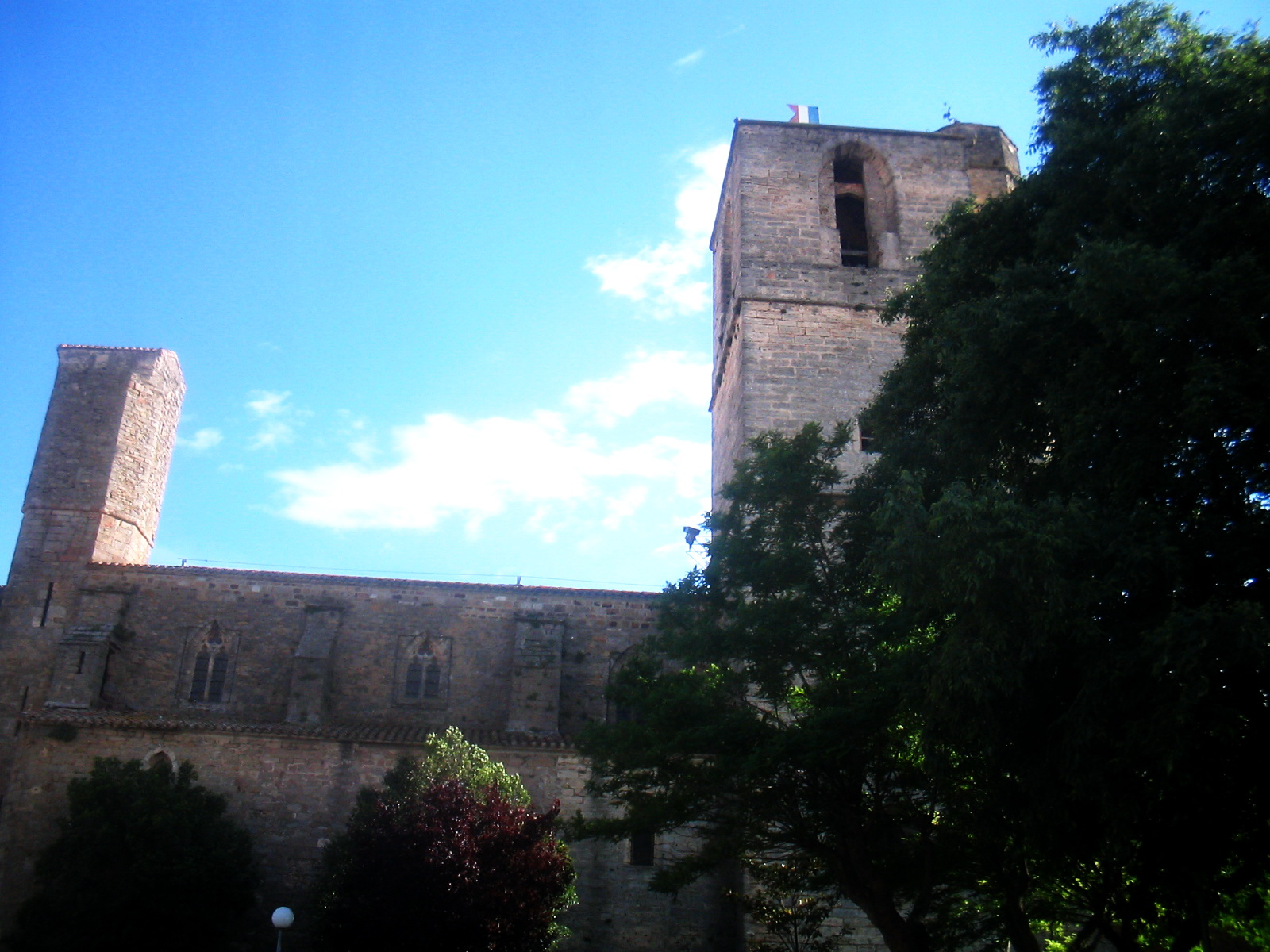 Église Saint-Félix à Lézignan-Corbières